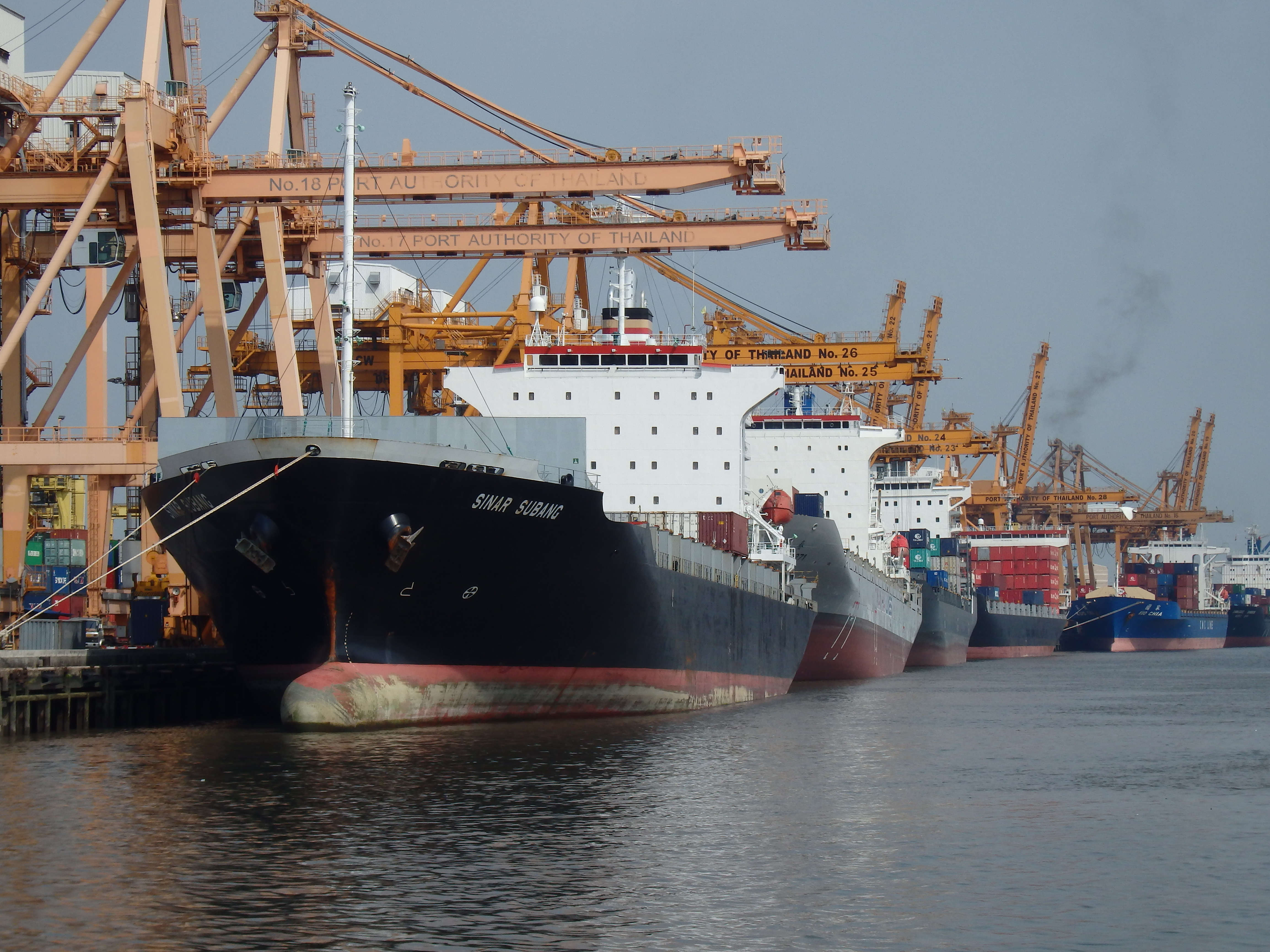 Sinar Subang cargo ship at Bangkok Port